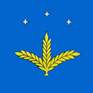 Прапор міста Каховка